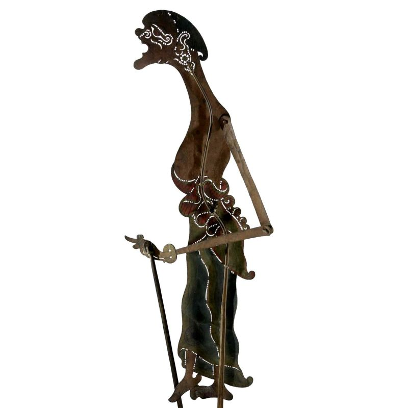 Wajangfiguur. Wajangfiguur van karbouwenhuid, een oude vrouw voorstellend, vermoedelijk een bediende Unknown language: wajang purwa Cangeh